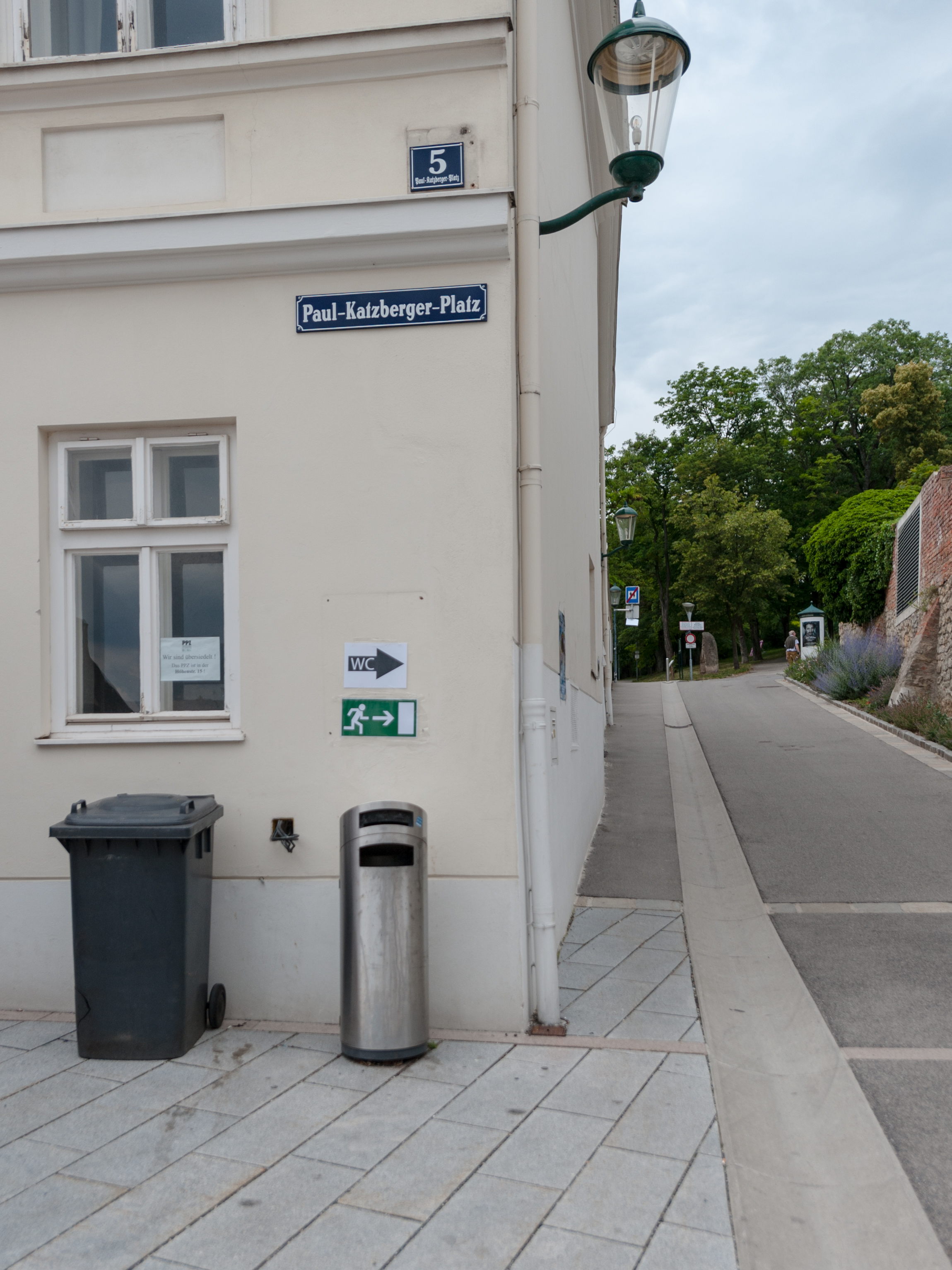 Paul-Katzberger-Platz (Schild)